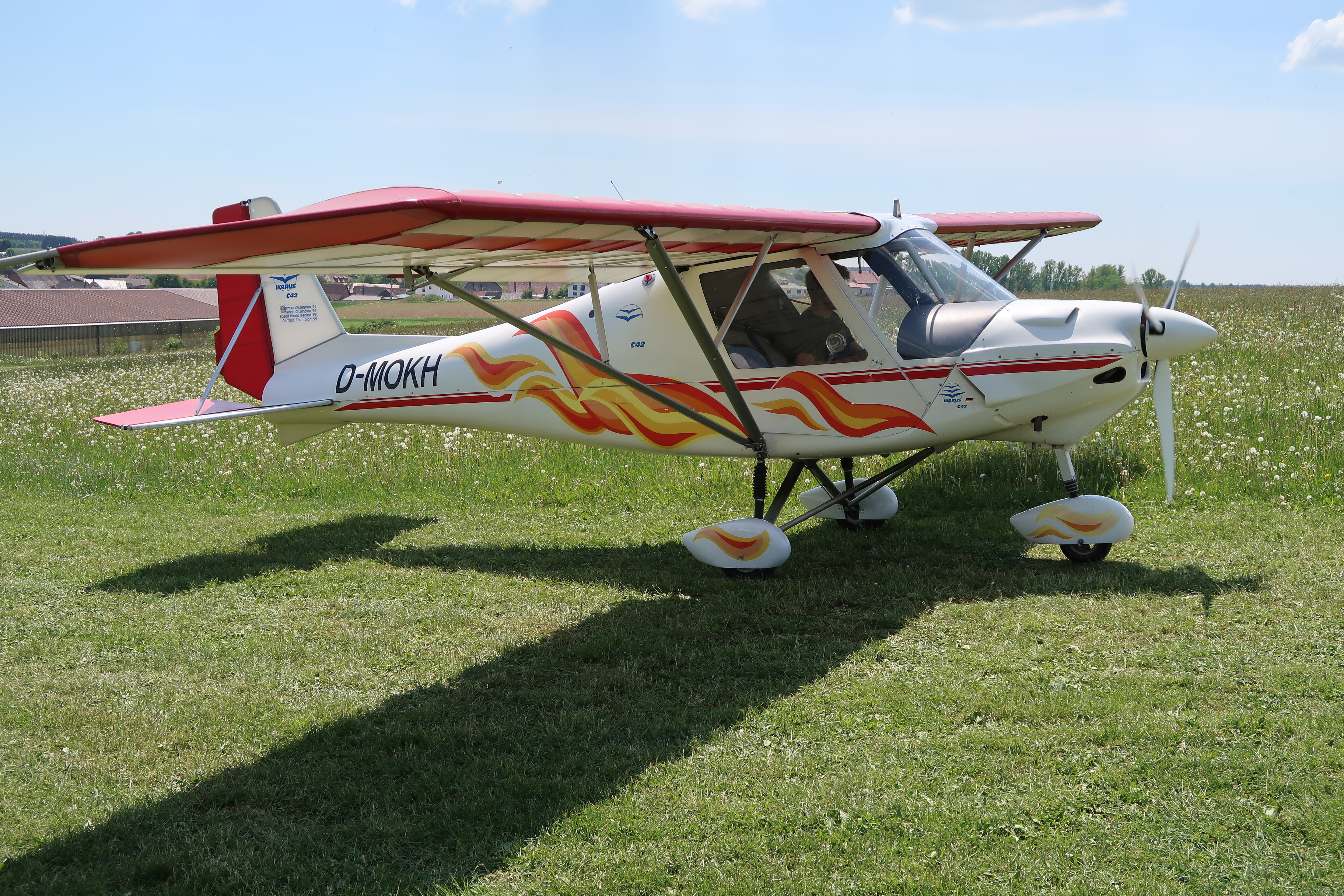 Deutschland (D) - Baden-Württemberg (BW) - Landkreis Sigmaringen (SIG) - Sauldorf-Boll, Ultraleichtfluggelände: "Ikarus C42" auf der Rollbahn